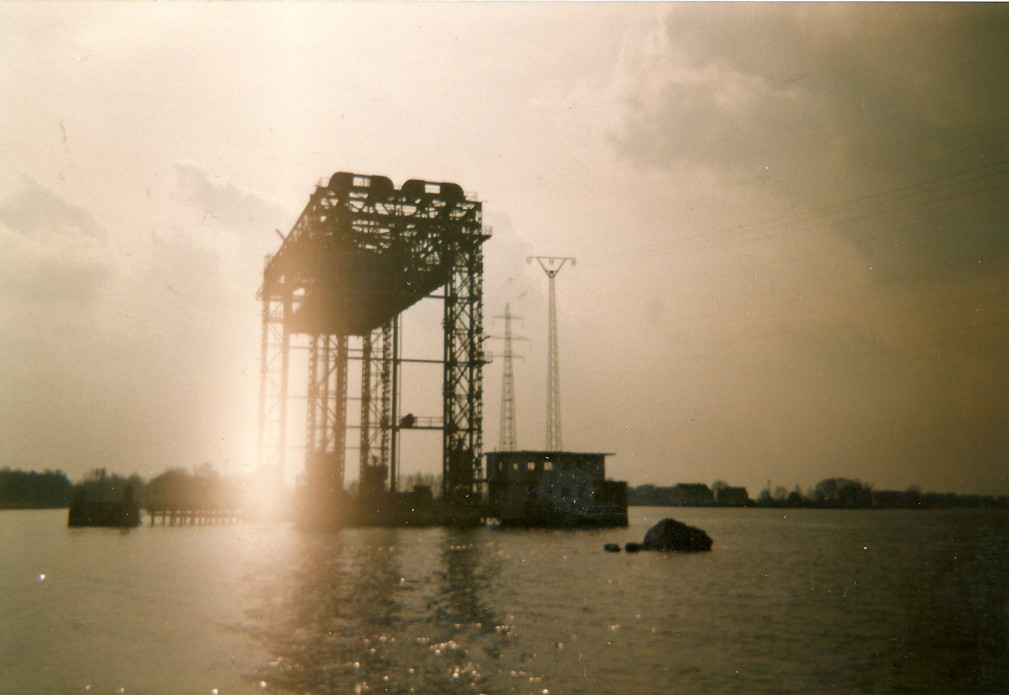 Karniner Brücke mit der Freileitung - hier noch mit Zwischenmast